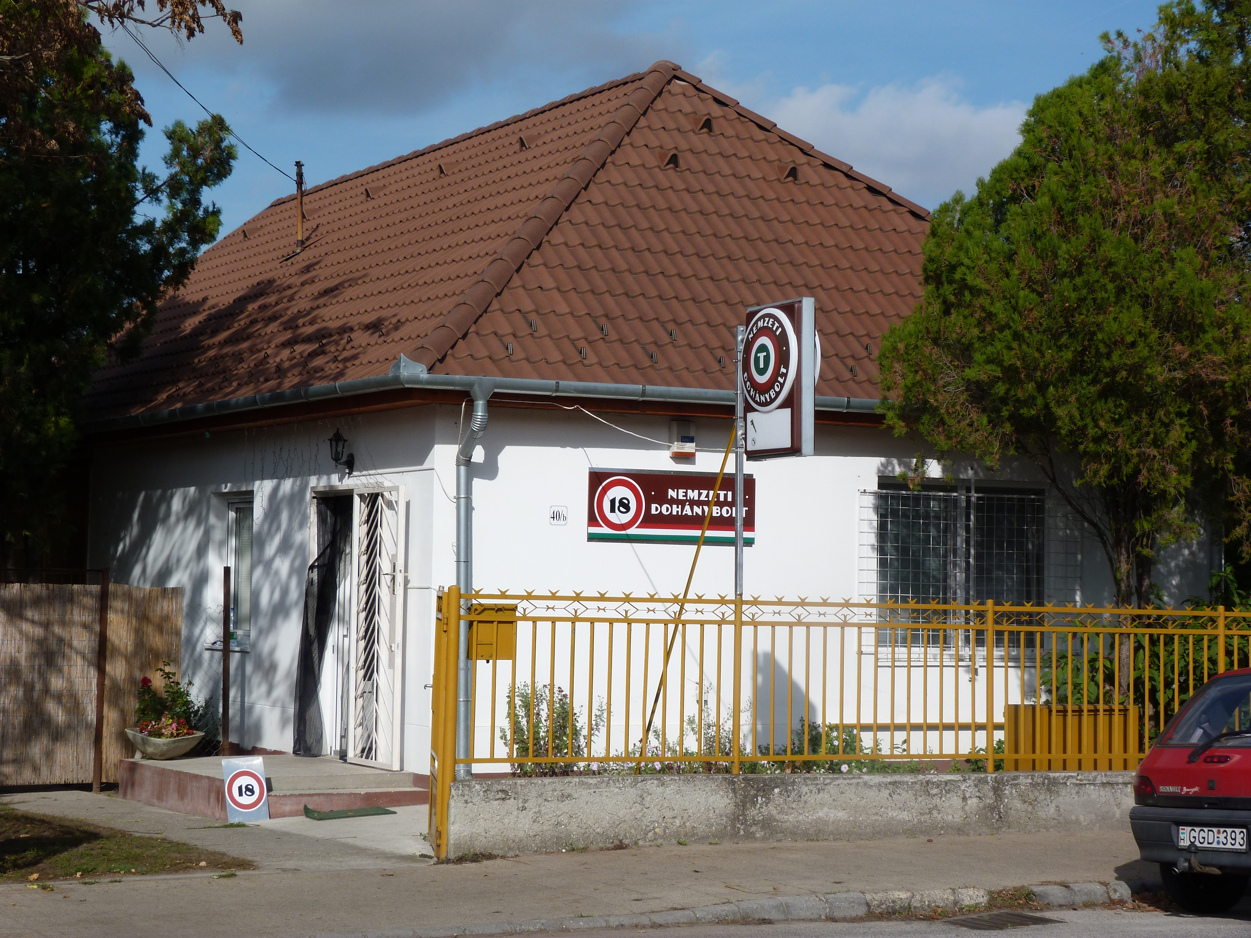 A felvétel 2013. október 22 -én, kedden készült Dabason. ©© Derzsi Elekes Andor, Budapest, 2013, You are authorised to use these photos and vids under Creative Commons – even for commercial, for profit purposes. Photos must be attributed to Derzsi Elekes Andor. All of the photos and vids in the Metapolisz DVD line are under Creative Commons and can be used even for commercial – for profit – purposes. Recommended Citation Derzsi Elekes Andor: Metapolisz DVD line